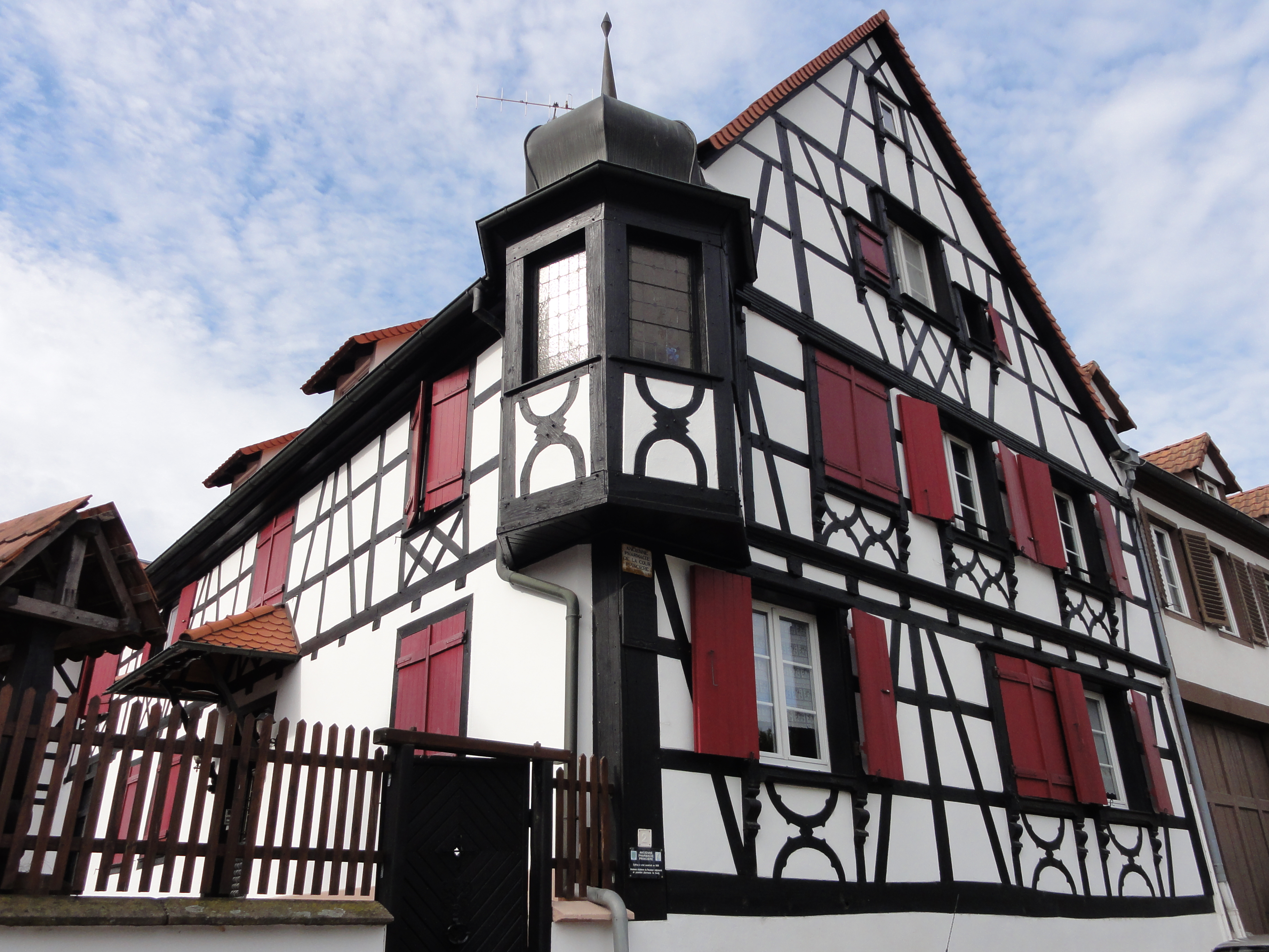 Alsace, Bas-Rhin, Bischwiller, Ancienne pharmacie de la cour princière (1681), 2 rue du Conseil (PA00084624, IA00124105).